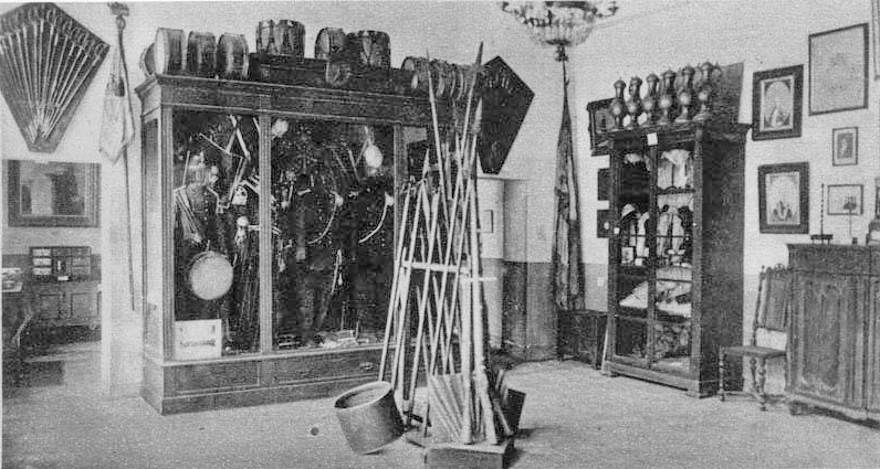 Interieur van het Geschied- en Oudheidkundig Museum in Maastricht, tussen 1914 en 1951 gevestigd in het vm. gereformeerd weeshuis, Lenculenstraat 33. In de kast de uniformen van de voormalige DD Stadsschutterij, opgeheven in 1907. Tegen de kast het vaandel. In de kast rechts een verzameling mutsen, enz. Op de kast de tinnen 'raadskannen'. Fotocollectie RHCL Maastricht, GAM 15145.